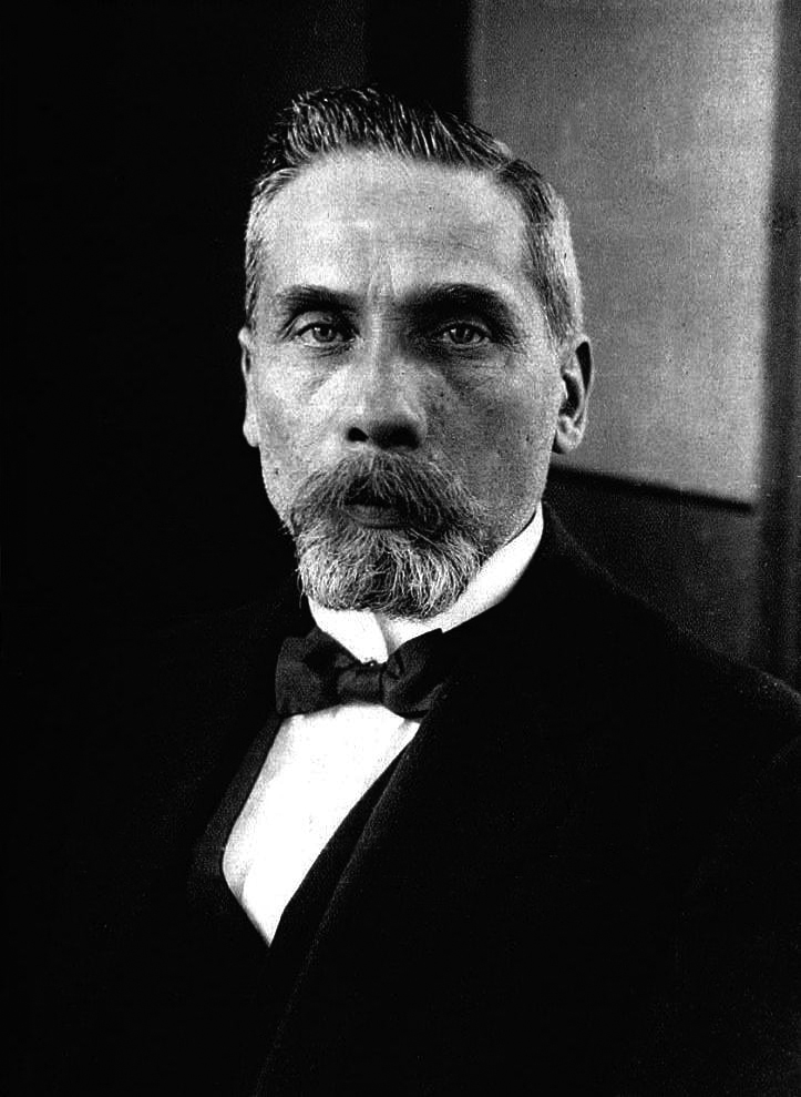 Ángel Guarello Costa (Valparaíso, 30 de octubre de 1866 - id, 11 de diciembre de 1931) fue abogado y político chileno. Fue electo como diputado, senador y alcalde, y designado como ministro e intendente.